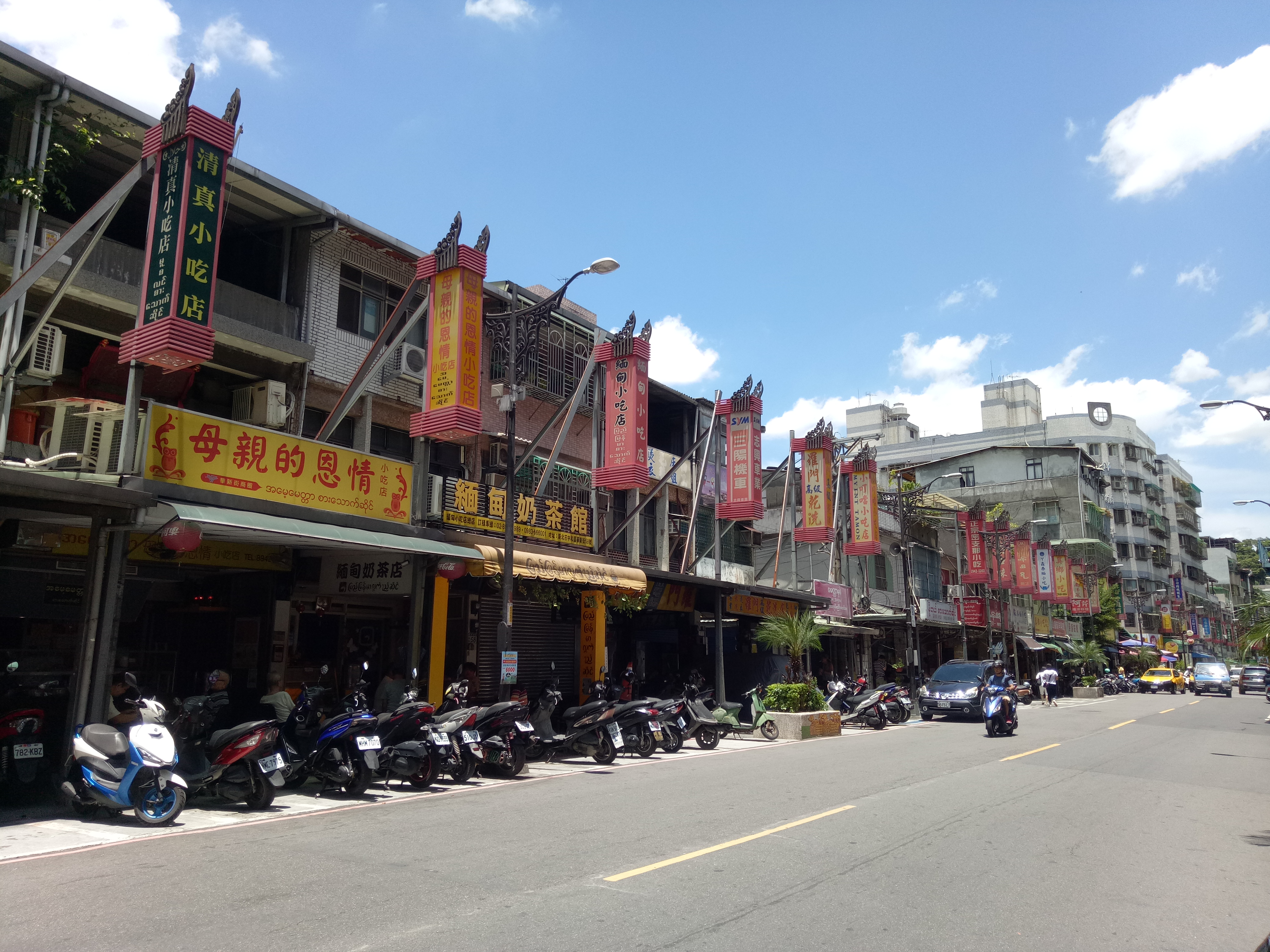 中和華新街商圈一景。